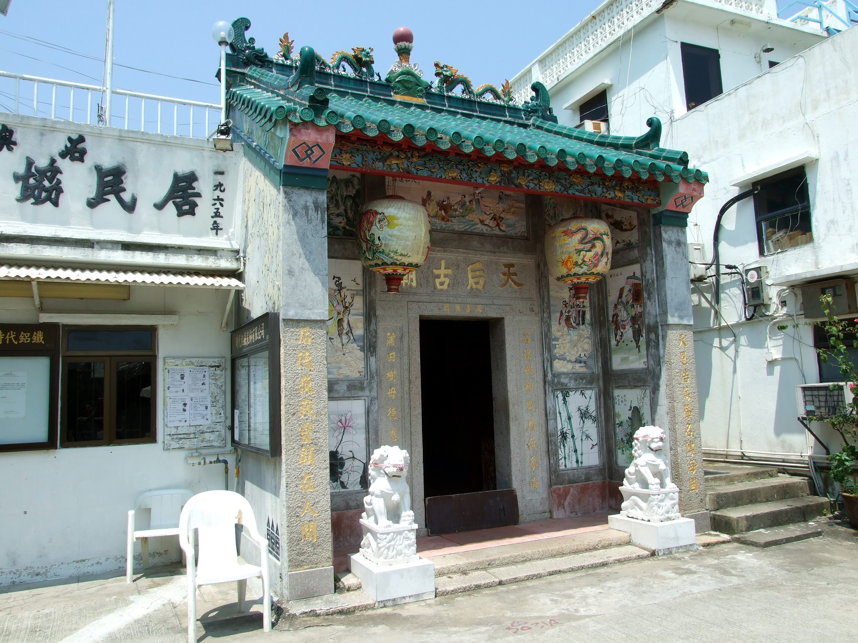 中文（香港）: 石澳天后廟